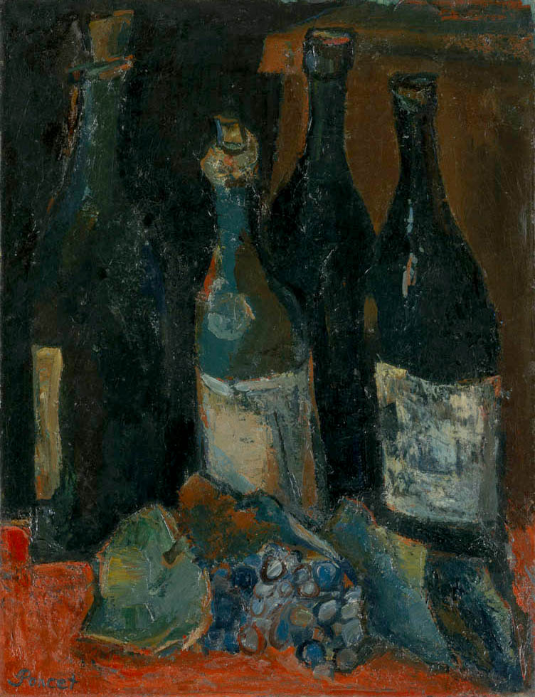 Huile sur toile, 1947